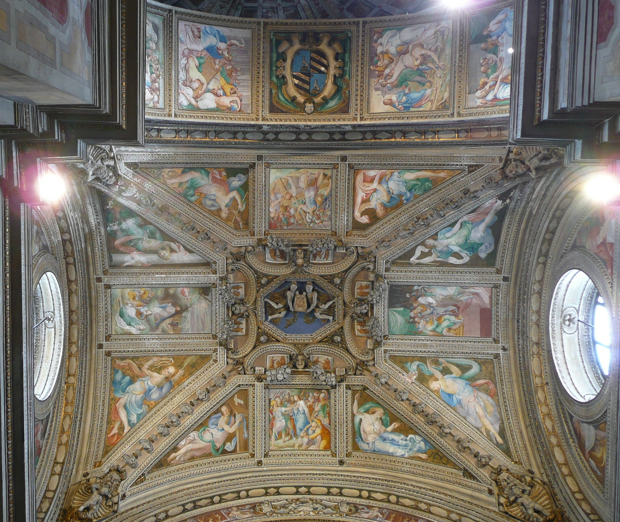 Il ciclo pittorico che si svolge sull’arcone d’ingresso, sulla volta e sulle pareti fu commissionato nel 1560 al pittore cremasco Carlo Urbino, autore degli affreschi e delle figure e cornici a stucco che li contornano, dai tipici motivi manieristi. Al centro dell’arcone d’ingresso si trova lo stemma gentilizio dei taverna, che ha nei due quarti un cane d’argento abbaiante contro una stella d’oro; Al suo fianco, i primi episodi del ciclo della Passione, La resurrezione di Lazzaro, La cacciata dei mercanti dal tempio, La cacciata da Nazareth e La Maddalena. Seguono poi nei quattro riquadri della volta, contornati da delicate figure angeliche, L’orazione nell’orto, La cattura, Gesù davanti a Pilato e La salita al Calvario. Il ciclo si conclude infine nel catino absidale con gli episodi La resurrezione e Noli me tangere.